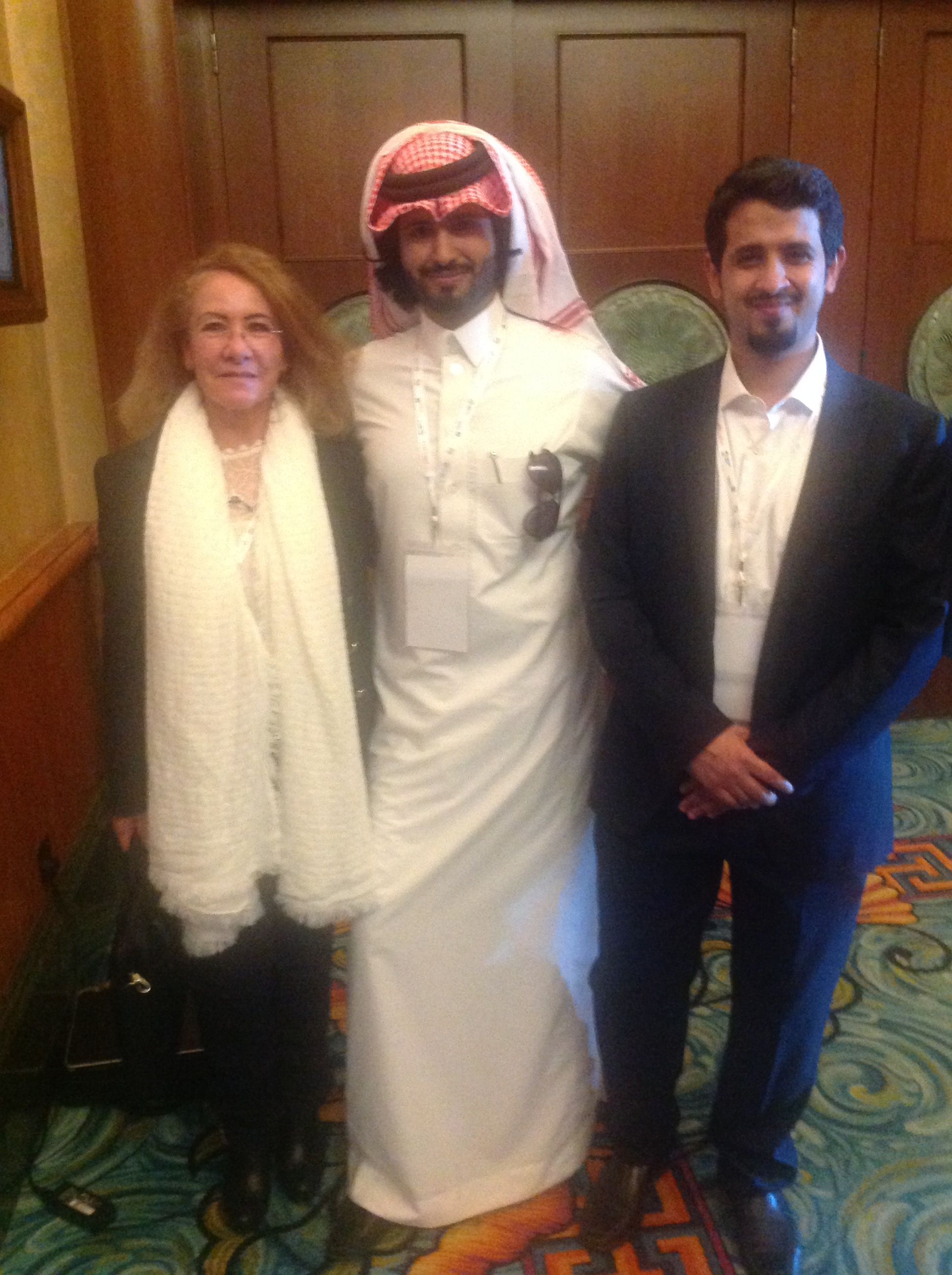 Dubai